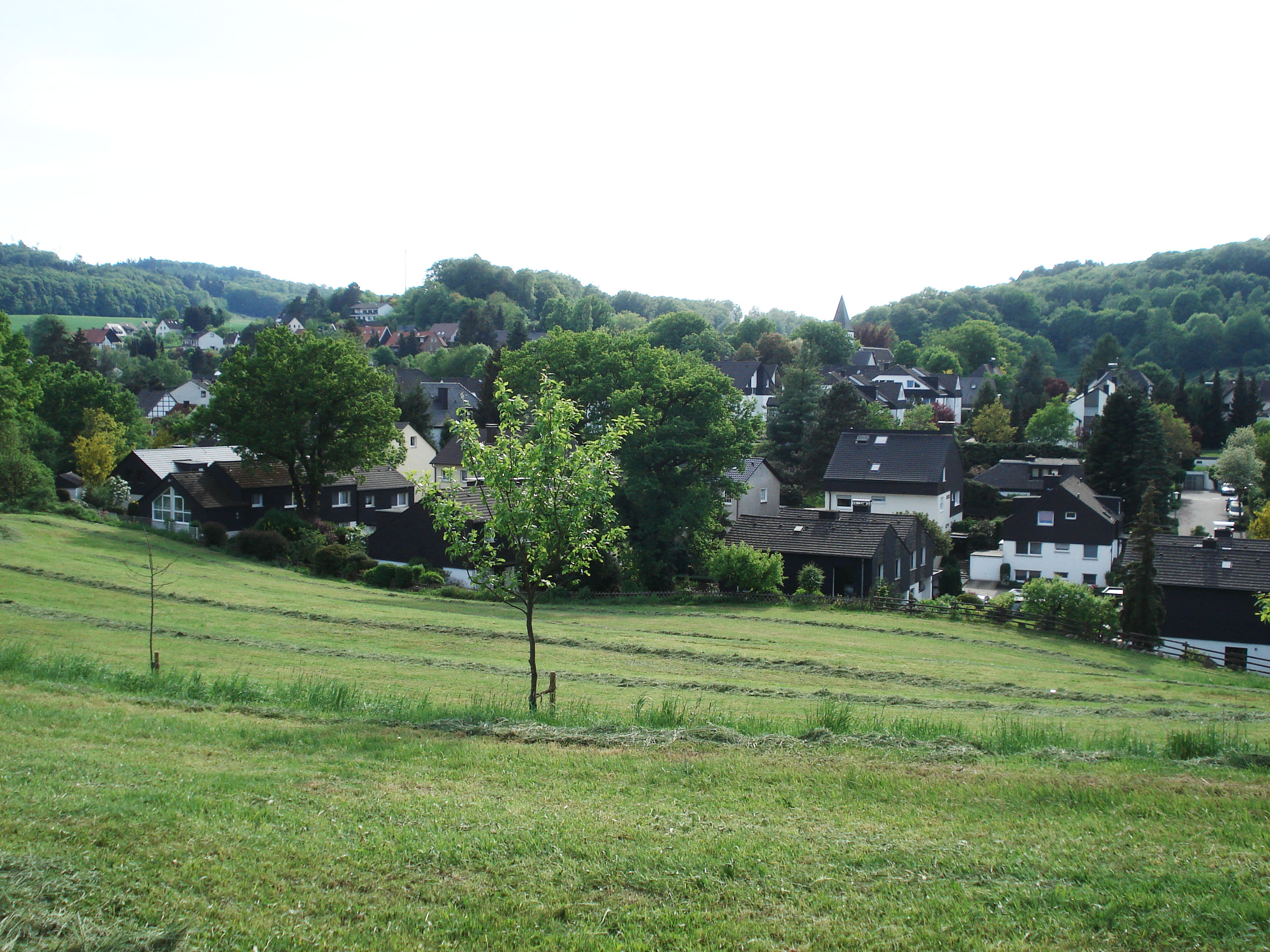 Hagen-Holthausen, Ansicht von Norden